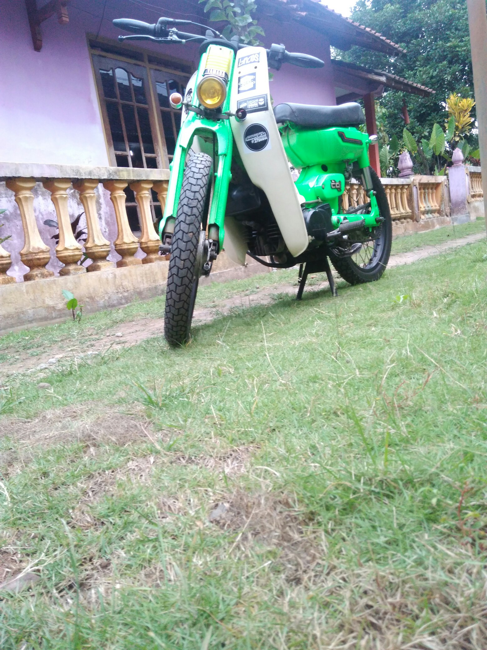 Basa Jawa: Motor iki asale saka Yamaha 80, kang dimodif dadi streetcub. Sing khas saka motor iki yaiku slebor mburi diketok lan slebor ngarep diilangi. Modif motor iki sejatine gampang, ananging kudu sabar aja kesusu pengin dadi.